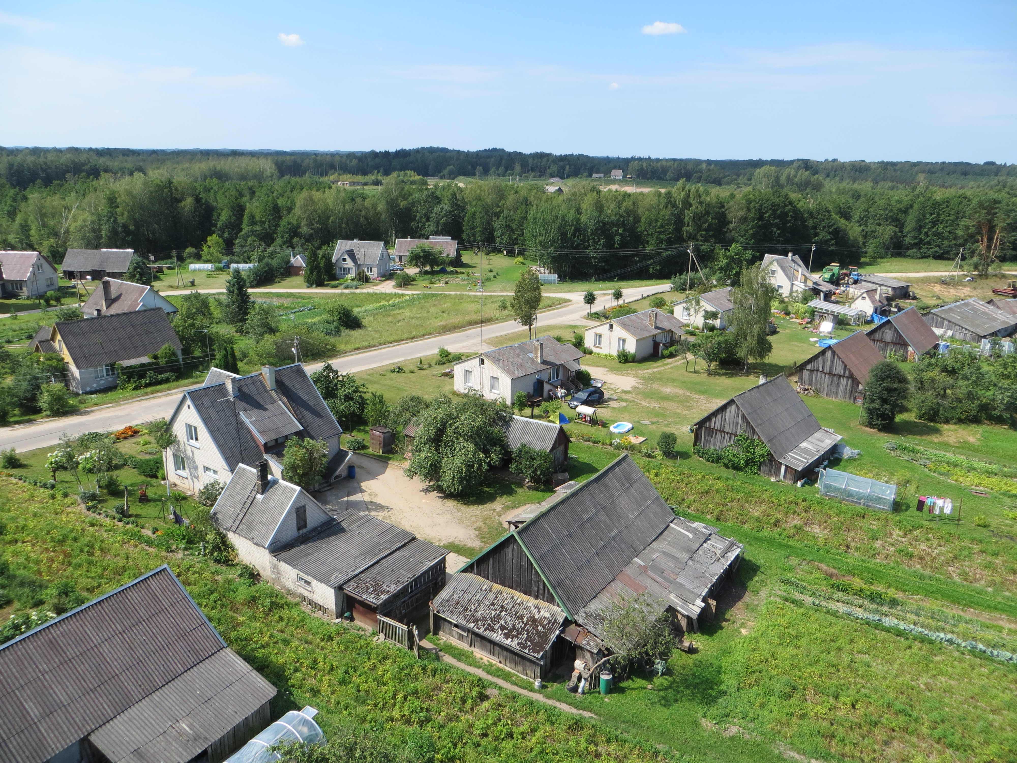 Imbradas, Lithuania